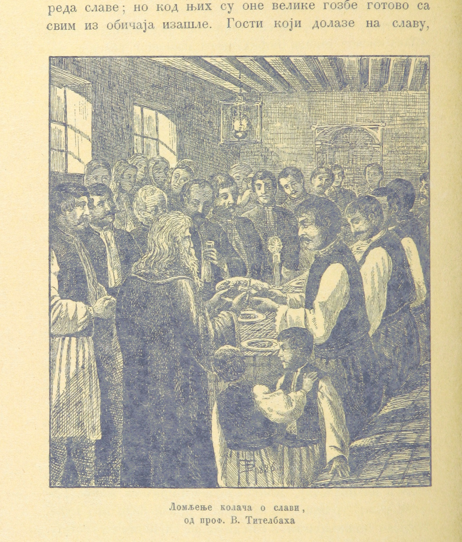 Image taken from page 190 of 'Србија, опис земле, народа и државе ... Илустровао ... В. Тителбах' (11187462976).